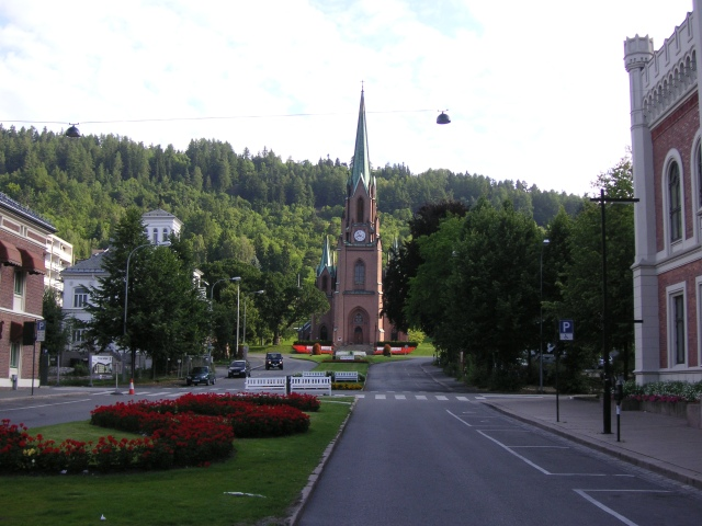 Kirche von Bragernes